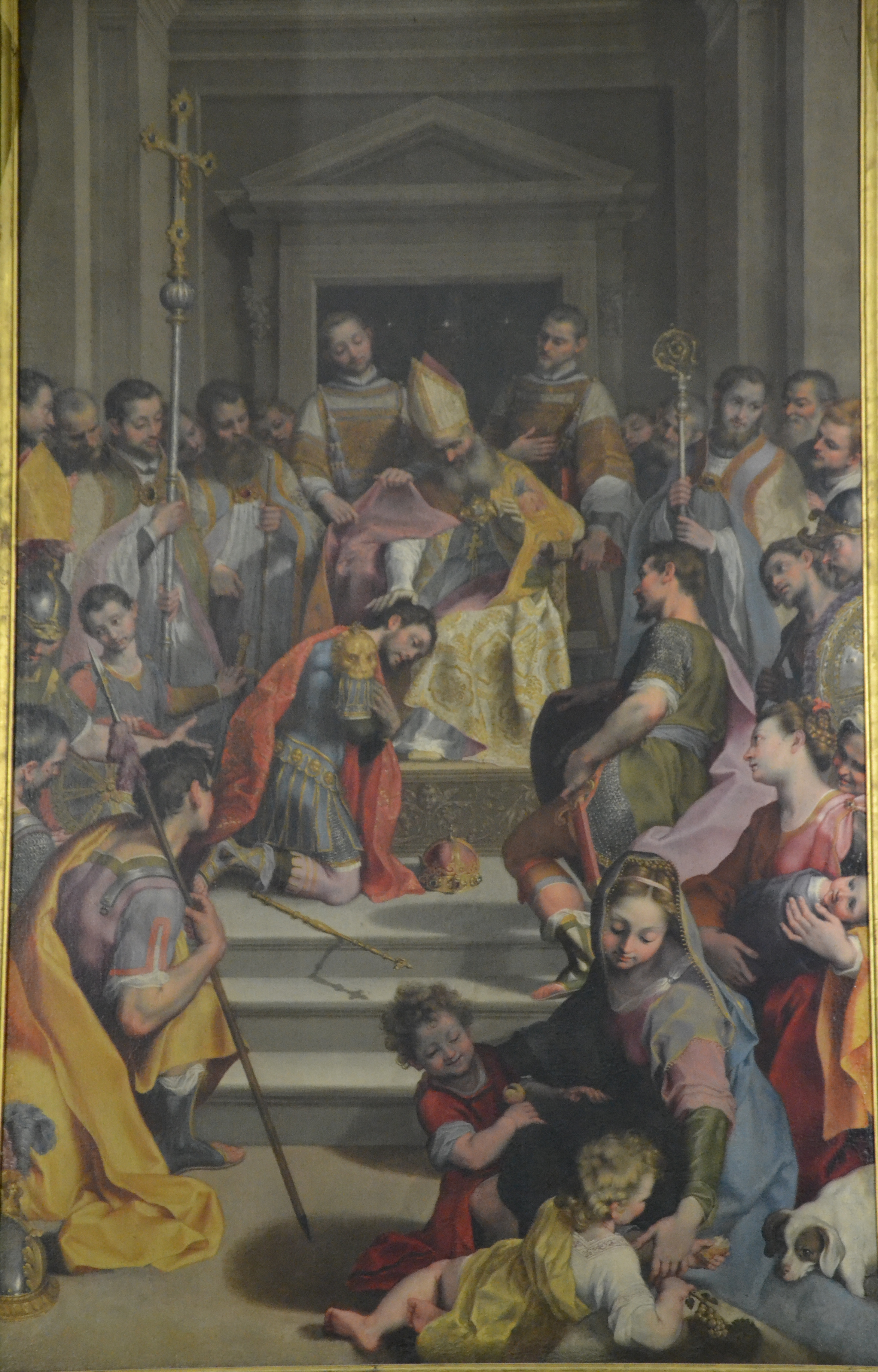 Duomo (Milano) Federico Barocci, "Sant'Ambrogio impone la penitenza all'imperatore Teodosio I"